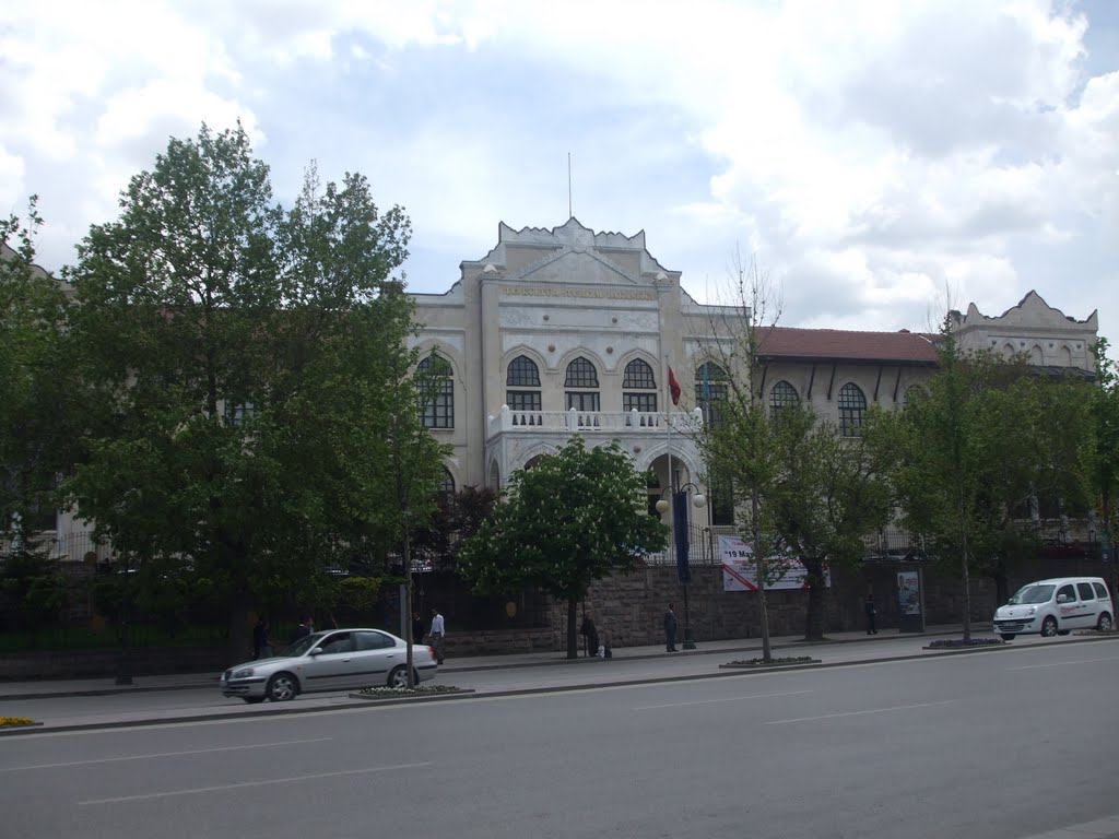 Türkiye Cumhuriyeti Kültür ve Turizm Bakanlığı binası (Atatürk Bulvarı, Opera / Ankara)